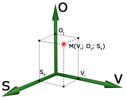 Миварное информационное пространство